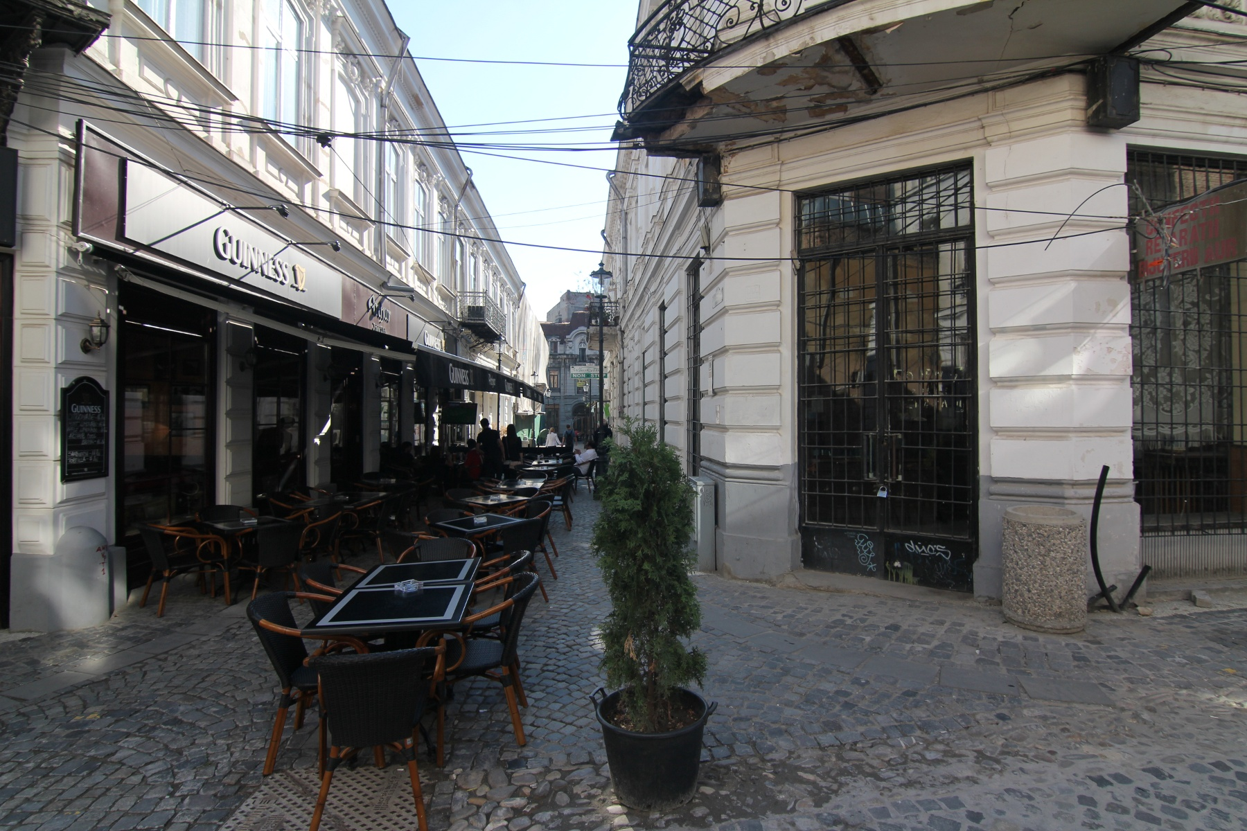 Ansamblul de arhitectură "Pasajul Francez"